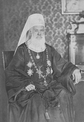 Georgije Branković (1830-1907)